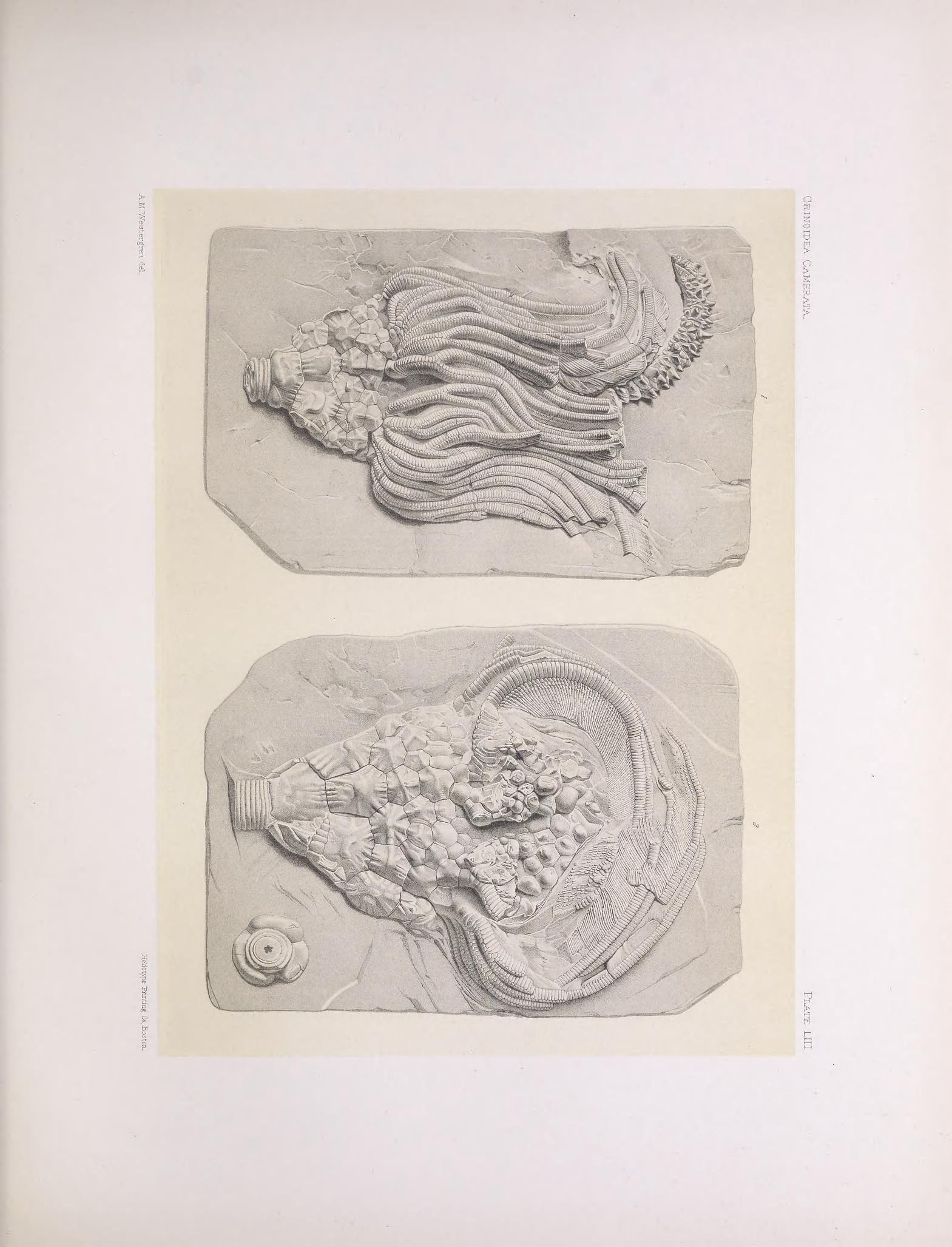 ft /